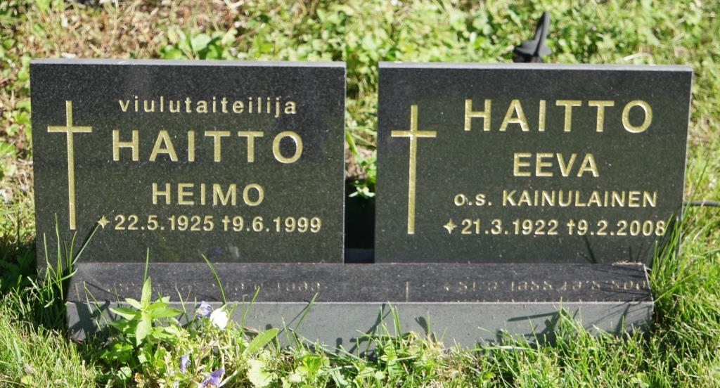 Grab des Violinisten Heimo Haitto (1925-1999) auf dem Friedhof Hietaniemi in Helsinki